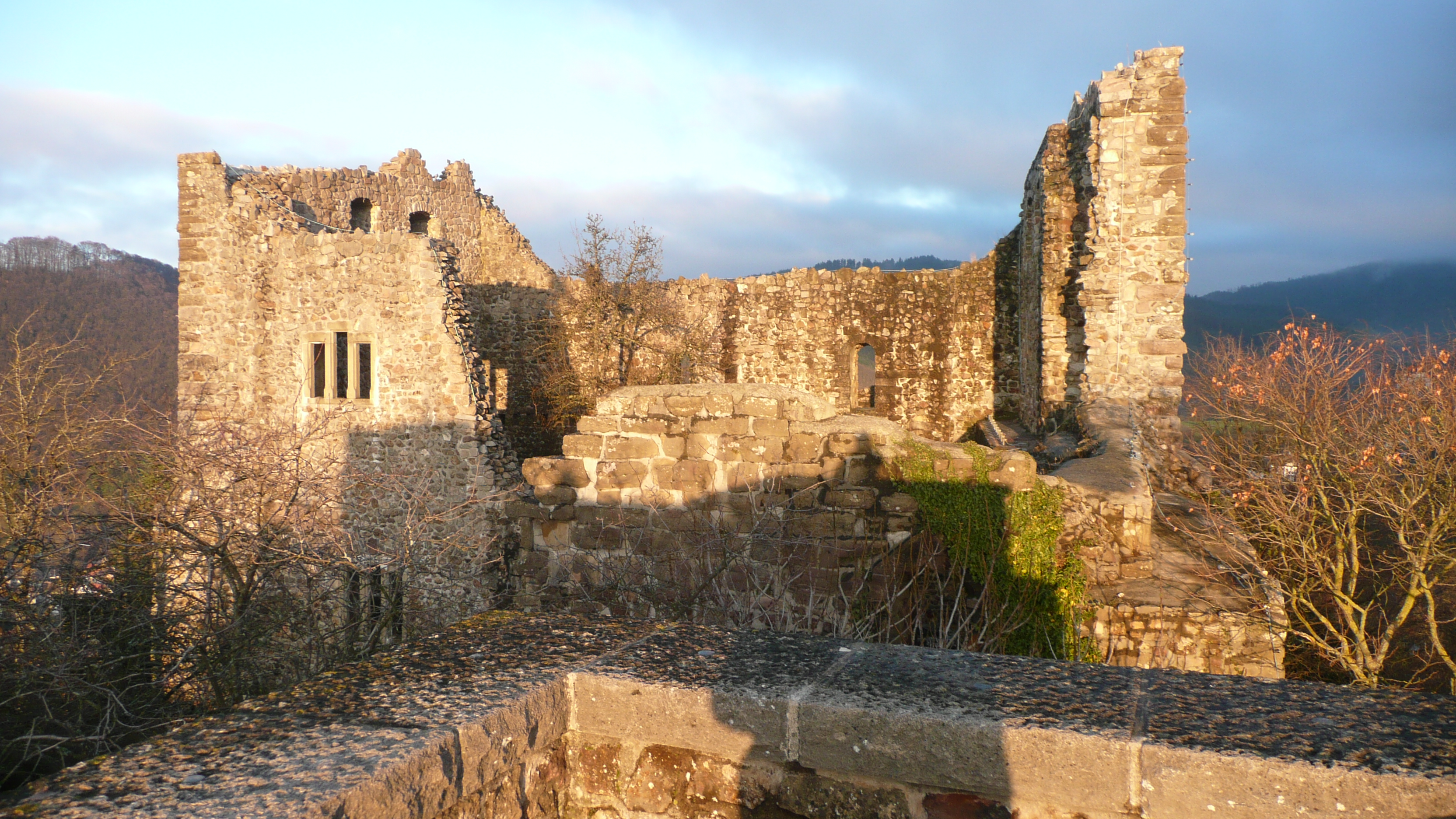 Burgruine in Badenweiler